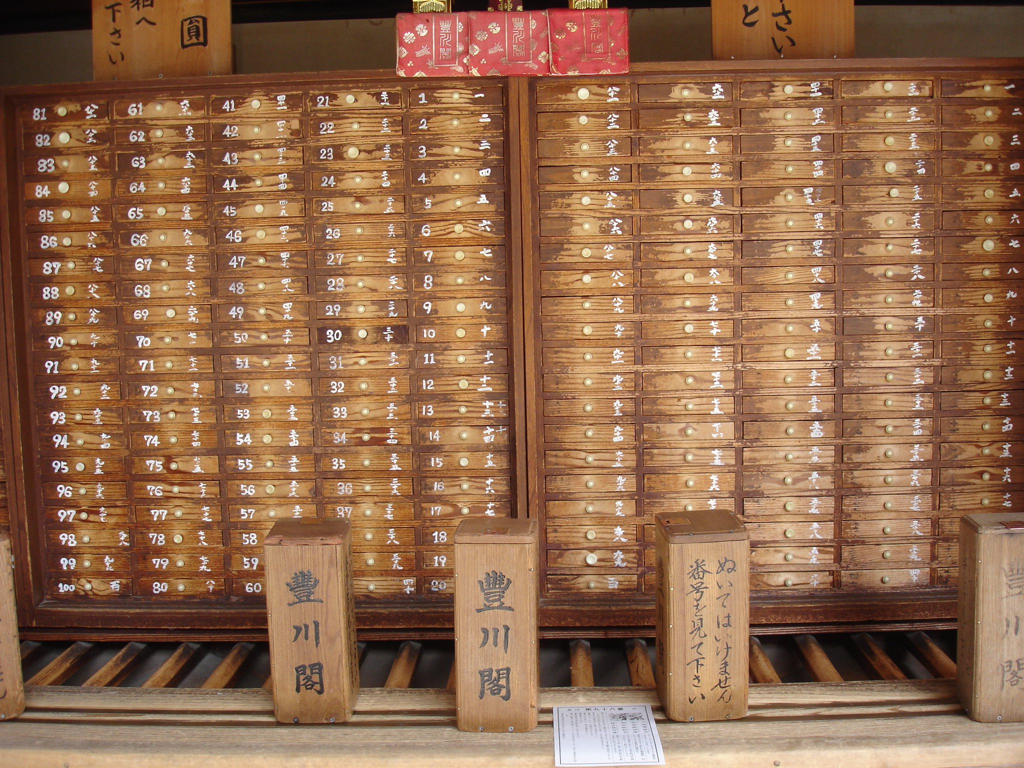 toyokawa_20110506095242